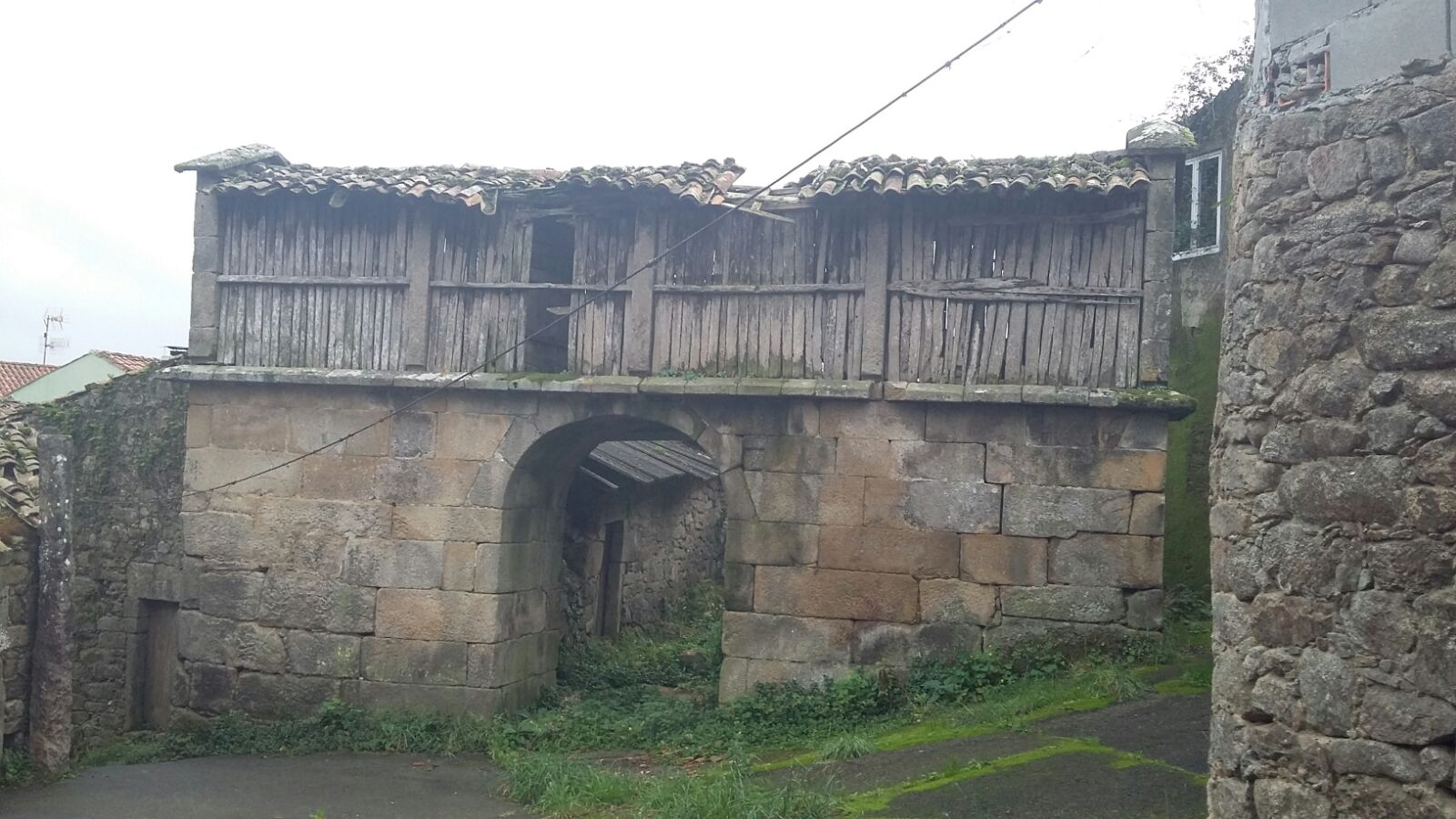 Vexa título